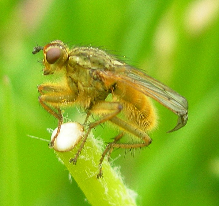 Mouche à merde Scathophaga stercoraria, photographiée près de Nonglard